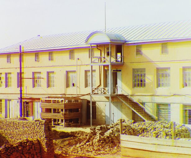 Səmədov Pambıq zavodu